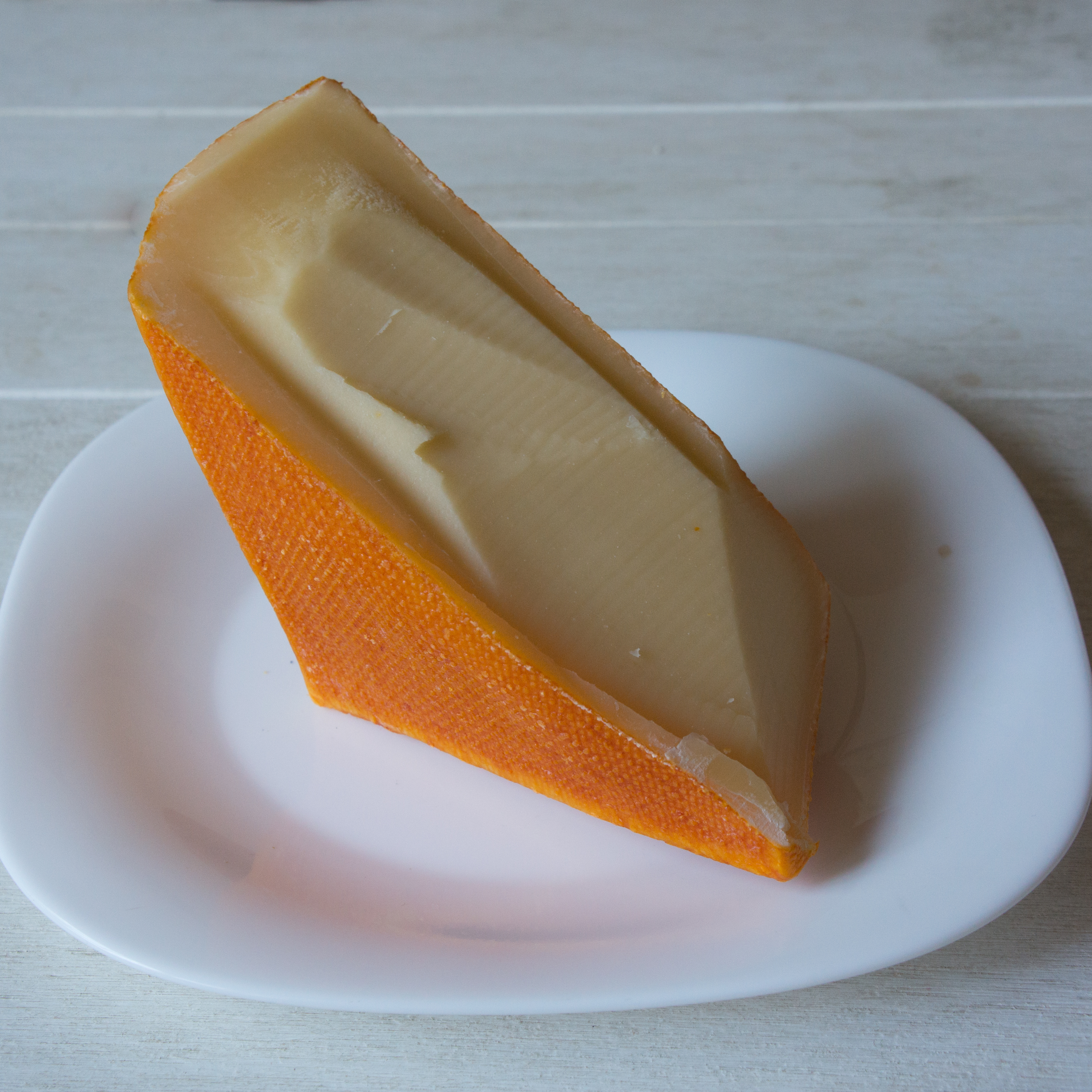 Vieil Or.